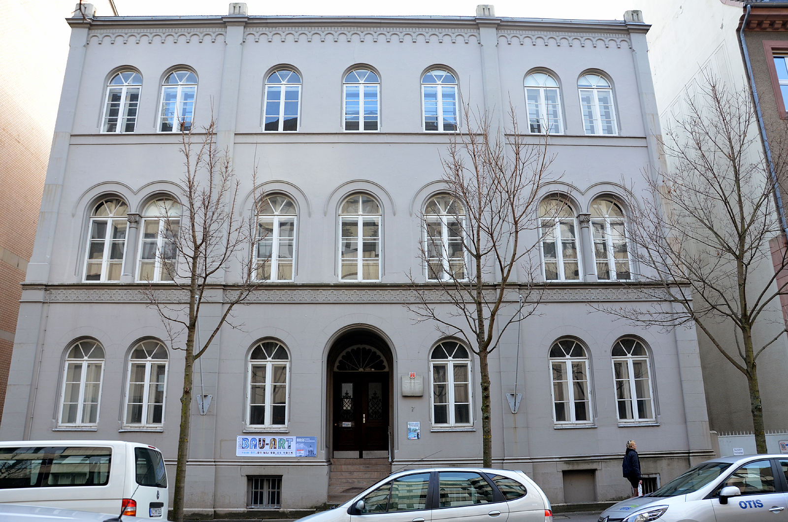 Das 1850 von Ernst Ebeling als eigenes Wohnhaus erbaute, heute denkmalgeschützte Haus Ebeling in der Landschaftstraße 7 in 30169 Hannover-Mitte, hier mit einem Transparent zur Ausstellung Bau-Art 2014 (vom 20. Februar bis 20. März 2014) ...